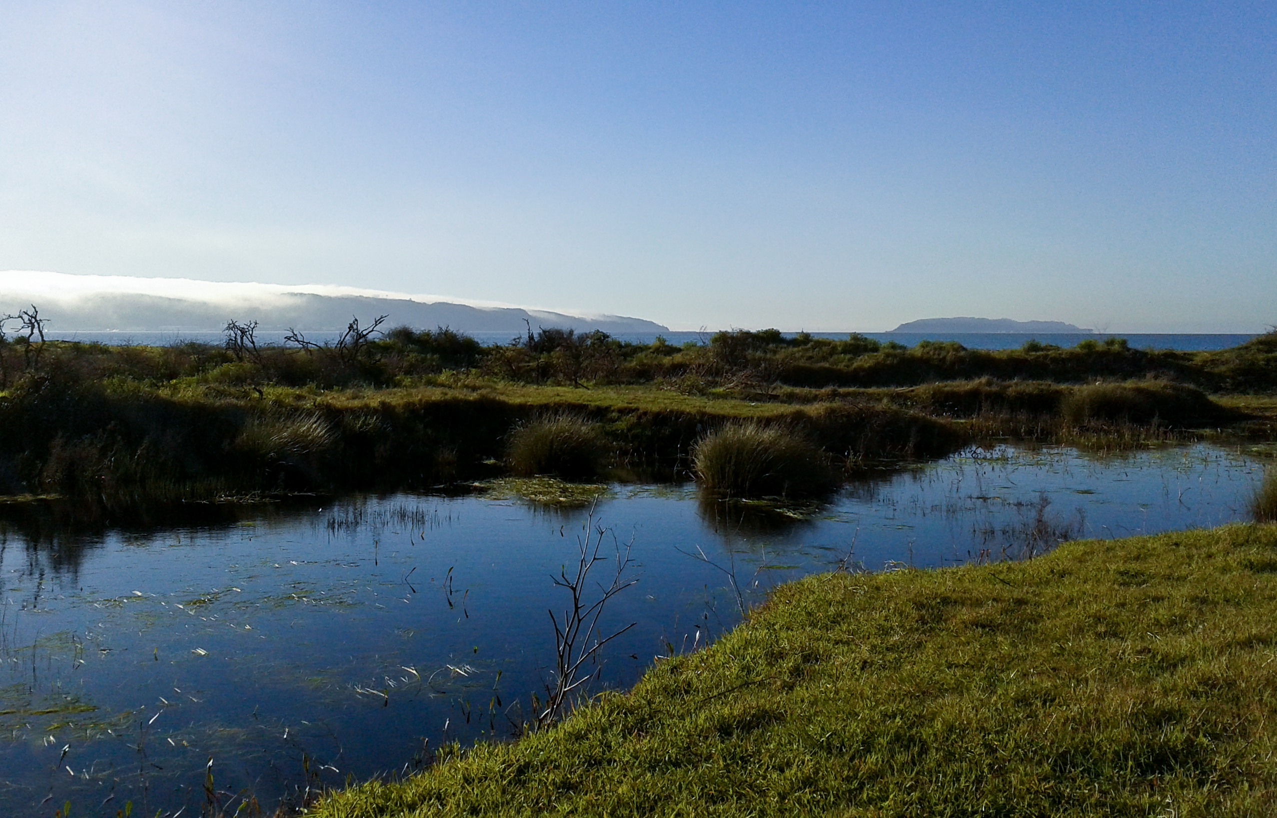 Al fondo a la derecha la Isla Quiriquina, a la izquierda la Península de Tumbes, vistas desde la Isla Rocuant.